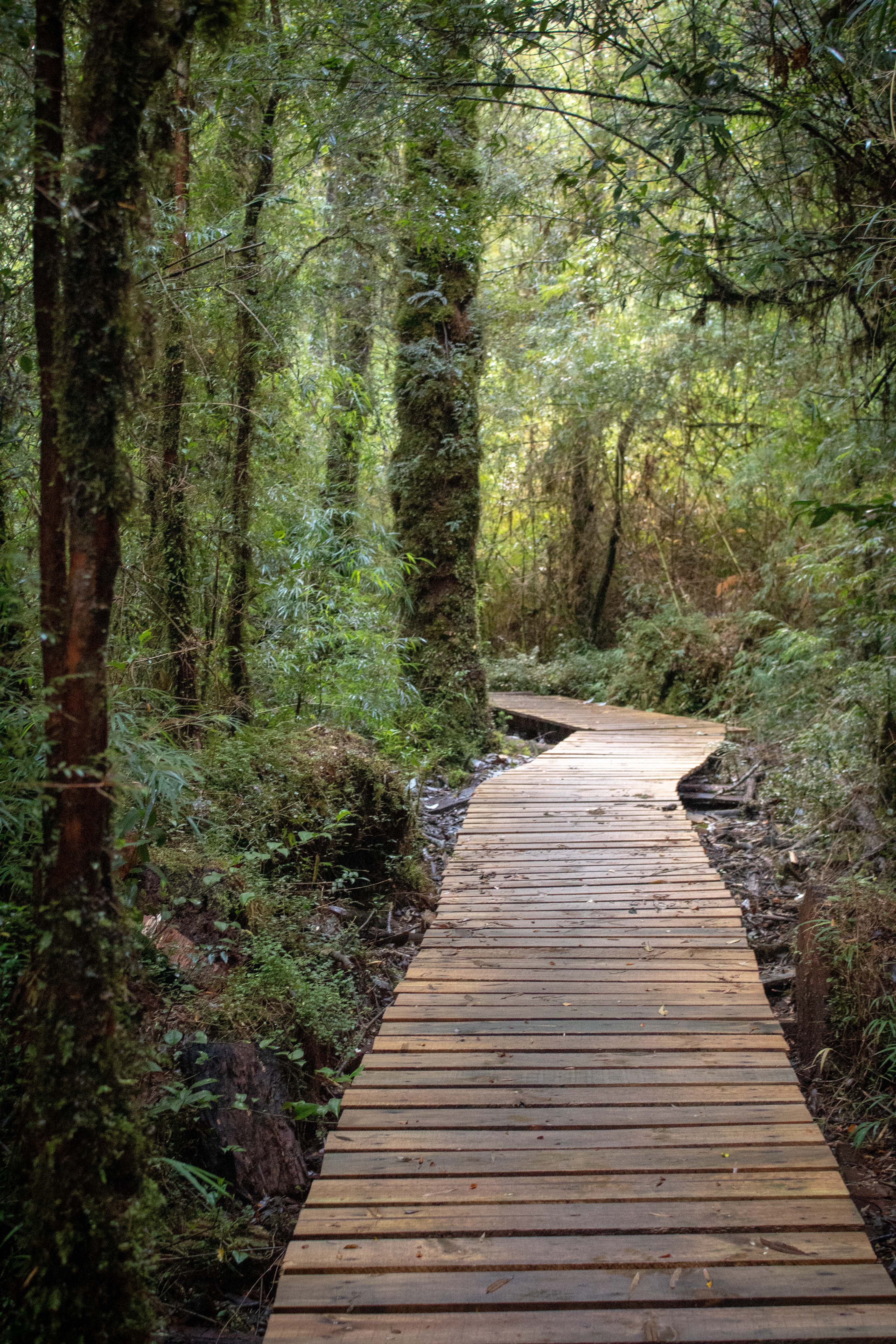 Sendero al Alerce Abuelo y Rodal de Alerces. Parque Nacional Alerce Andino, Región de Los Lagos, Chile.